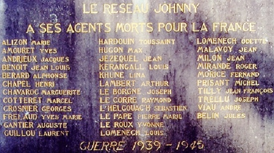 Plaque commémorative rappelant le nom de morts du réseau Johnny, réseau de renseignements pendant la Seconde guerre mondiale, située sur un mur près de l'église de La Trinité à Quimper (Kerfeunteun).